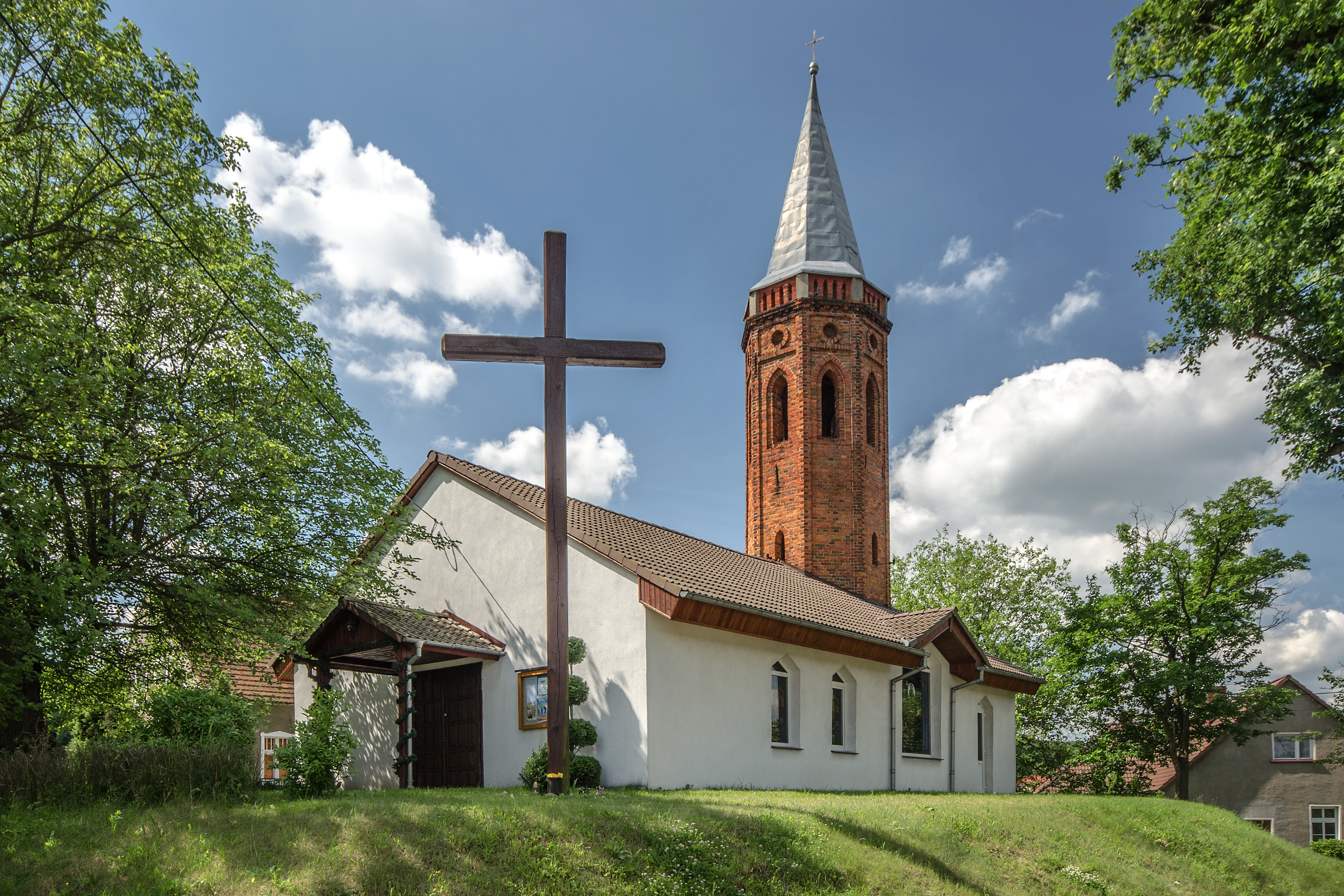 Kościół św Jerzego Męczennika w Buchałowie, woj.lubuskie, pow. zielonogórski, gm. Świdnica